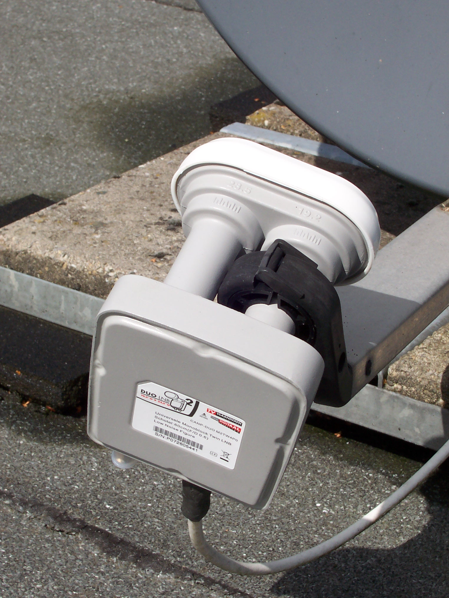 Duo LNB 60 Twin voor de gelijktijdige ontvangst van Astra 19,2° Oost en 23,5° Oost